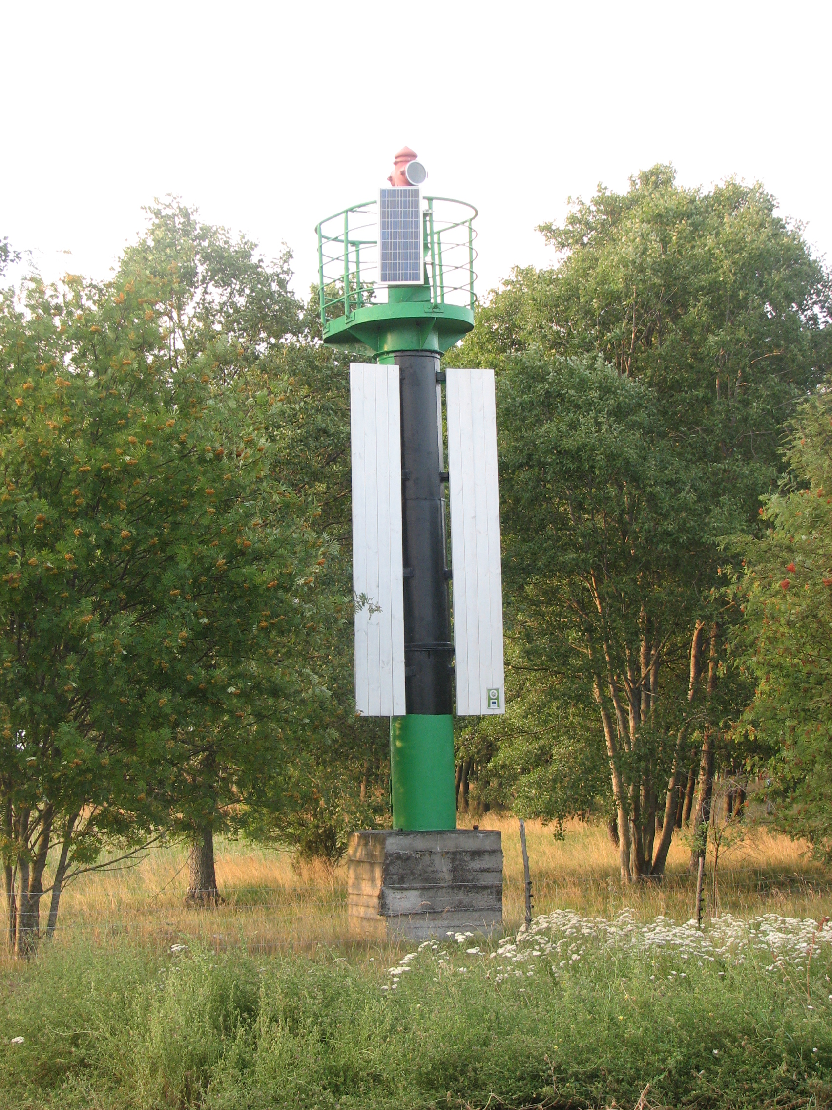 Orjaku sadama sihi ülemine tulepaak